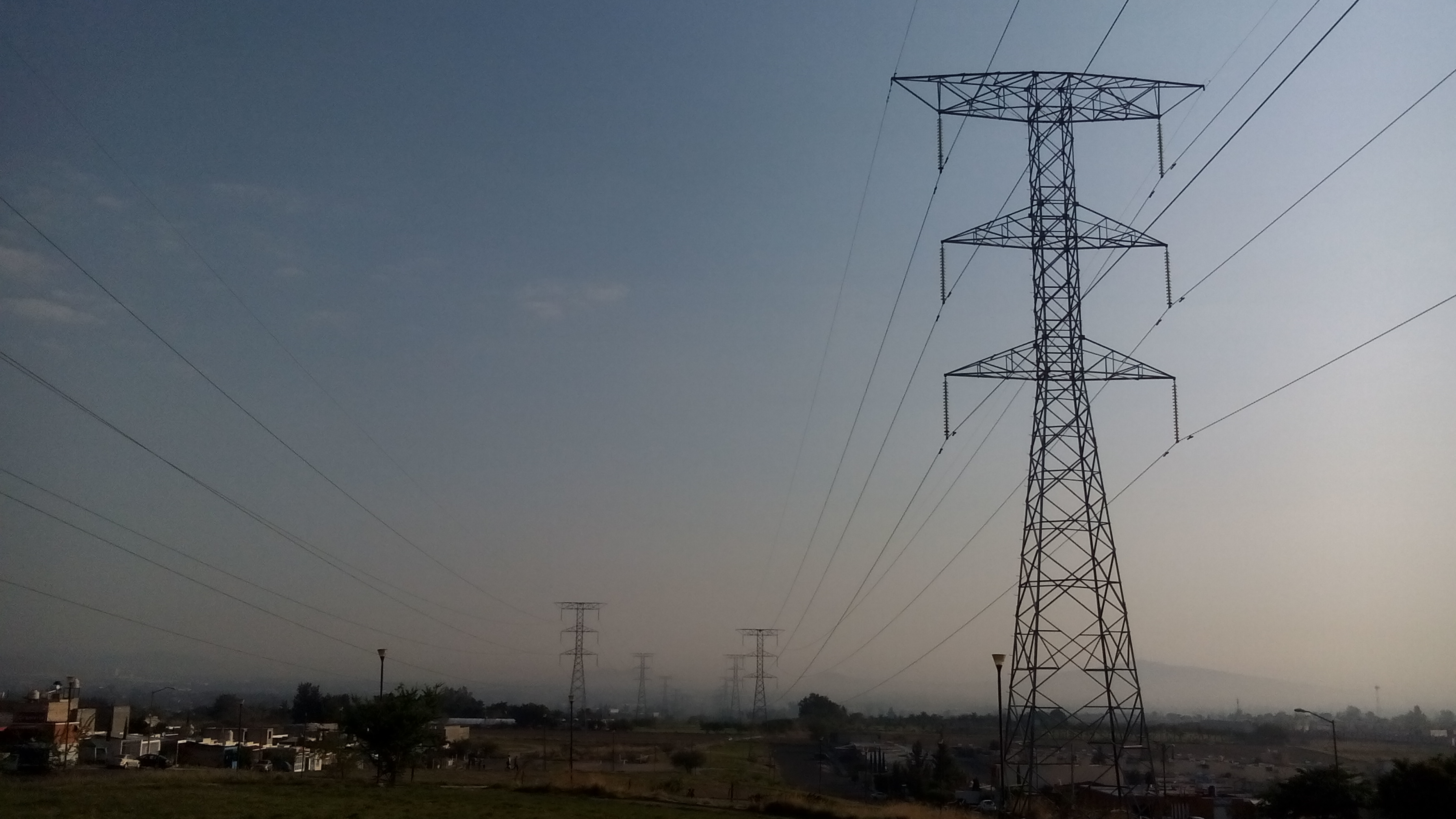 Torres de alta tensión en que se encuentran en el fraccionamiento Villas Terranova en Tlajomulco de Zúñiga.